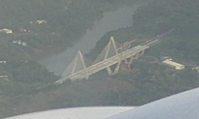 Vista de el "Puente Atirantado" en la frontera entre Bayamon, Puerto Rico y Naranjito, Puerto Rico.